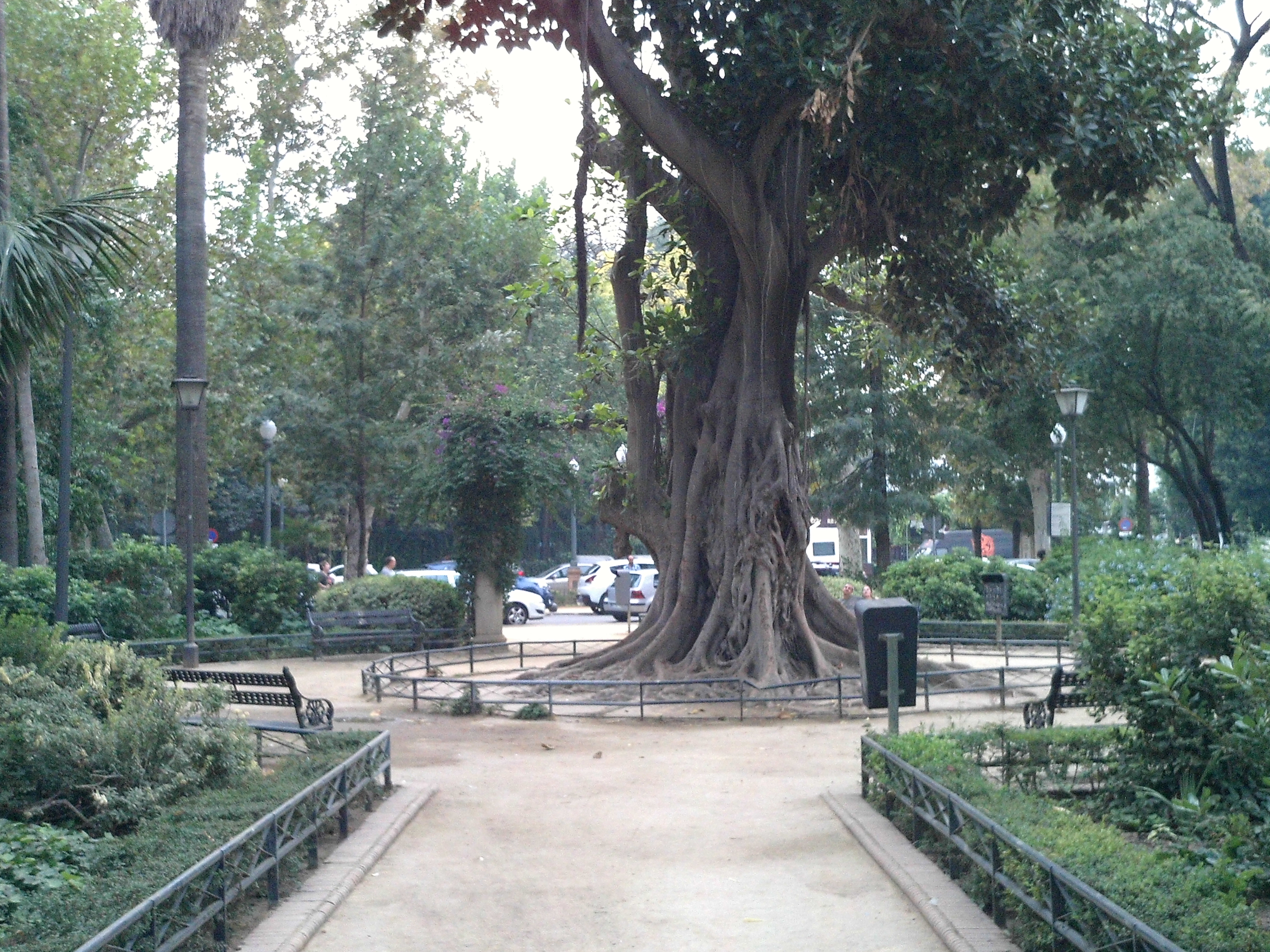 Glorieta de Goya, con un gran ficus en el centro. Sevilla, Andalucía, España.